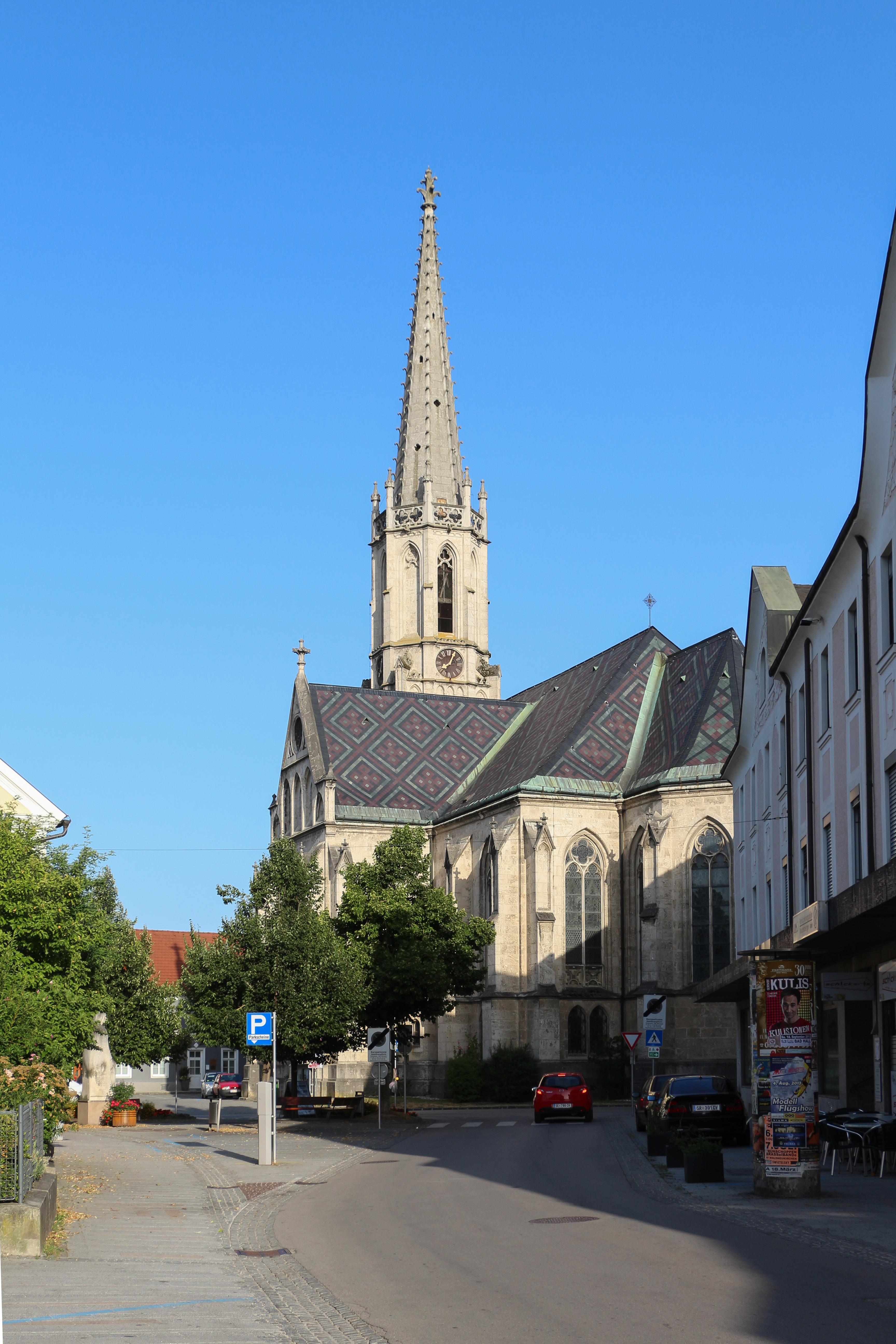 Bad Hall - Kath. Pfarrkirche hl. Erlöser